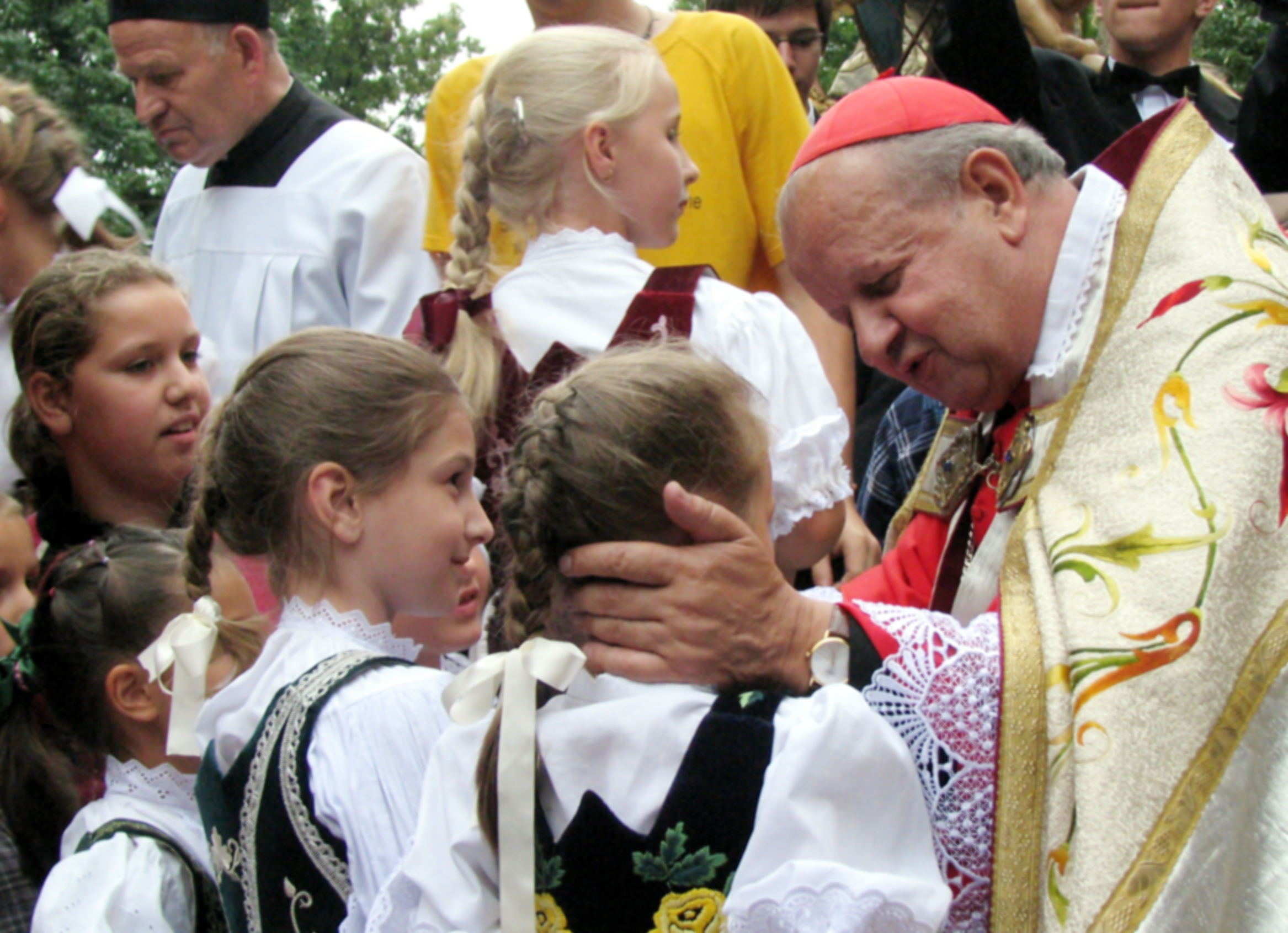 Kardynał Dziwisz w Kalwarii Zebrzydowskiej - Procesja Zaśnięcia NMP 2007